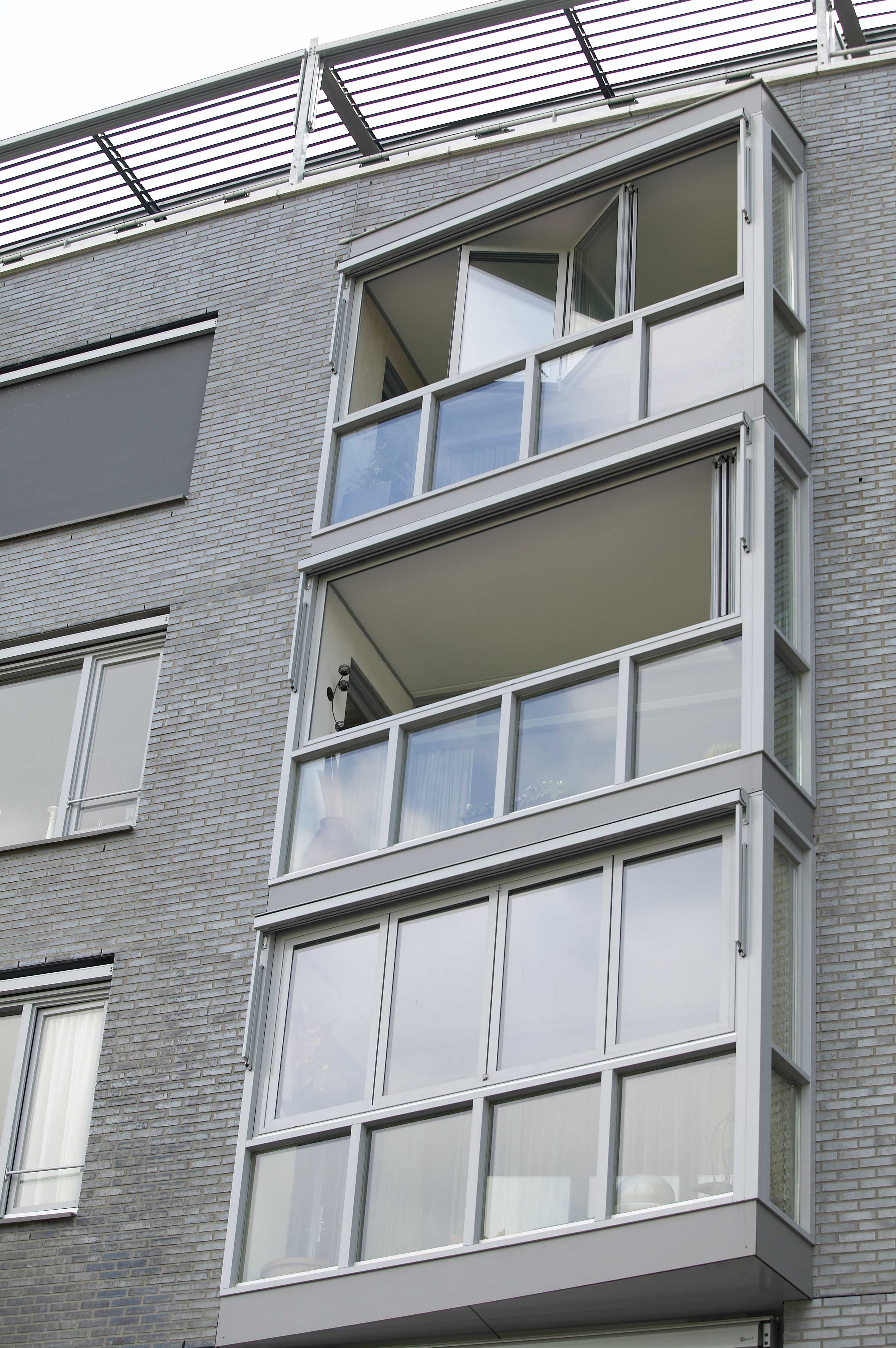 Balkonverglasung SL 35; angefaltet, voll geöffnet und im geschlossenen Zustand